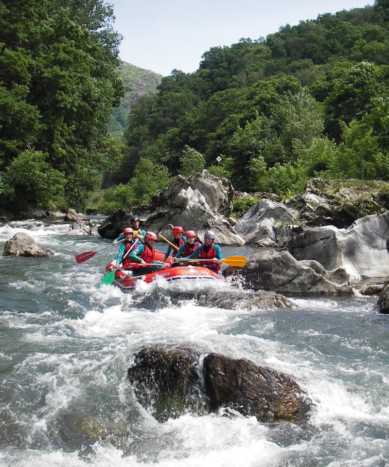 Ur Bizia Rafting en raft, dans le rapide de la "Charlotte" sur le parcours Ossès Bidarray